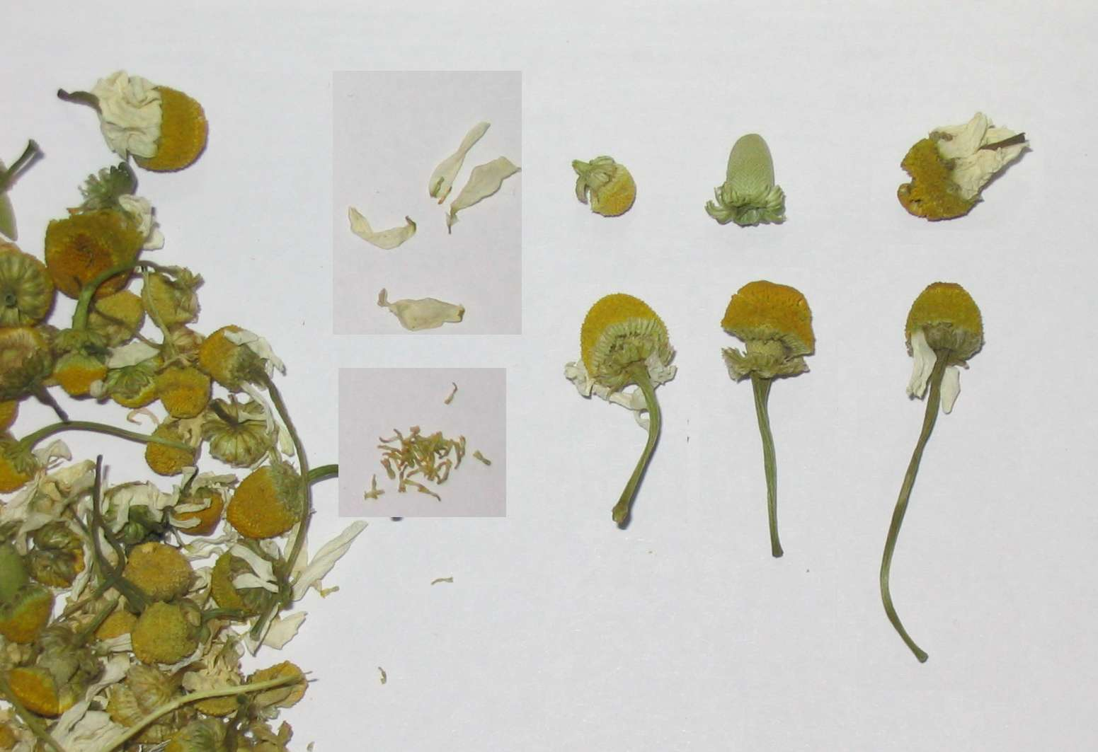 Kamillenblüten (Chamomillae flos), Arzneibuchware